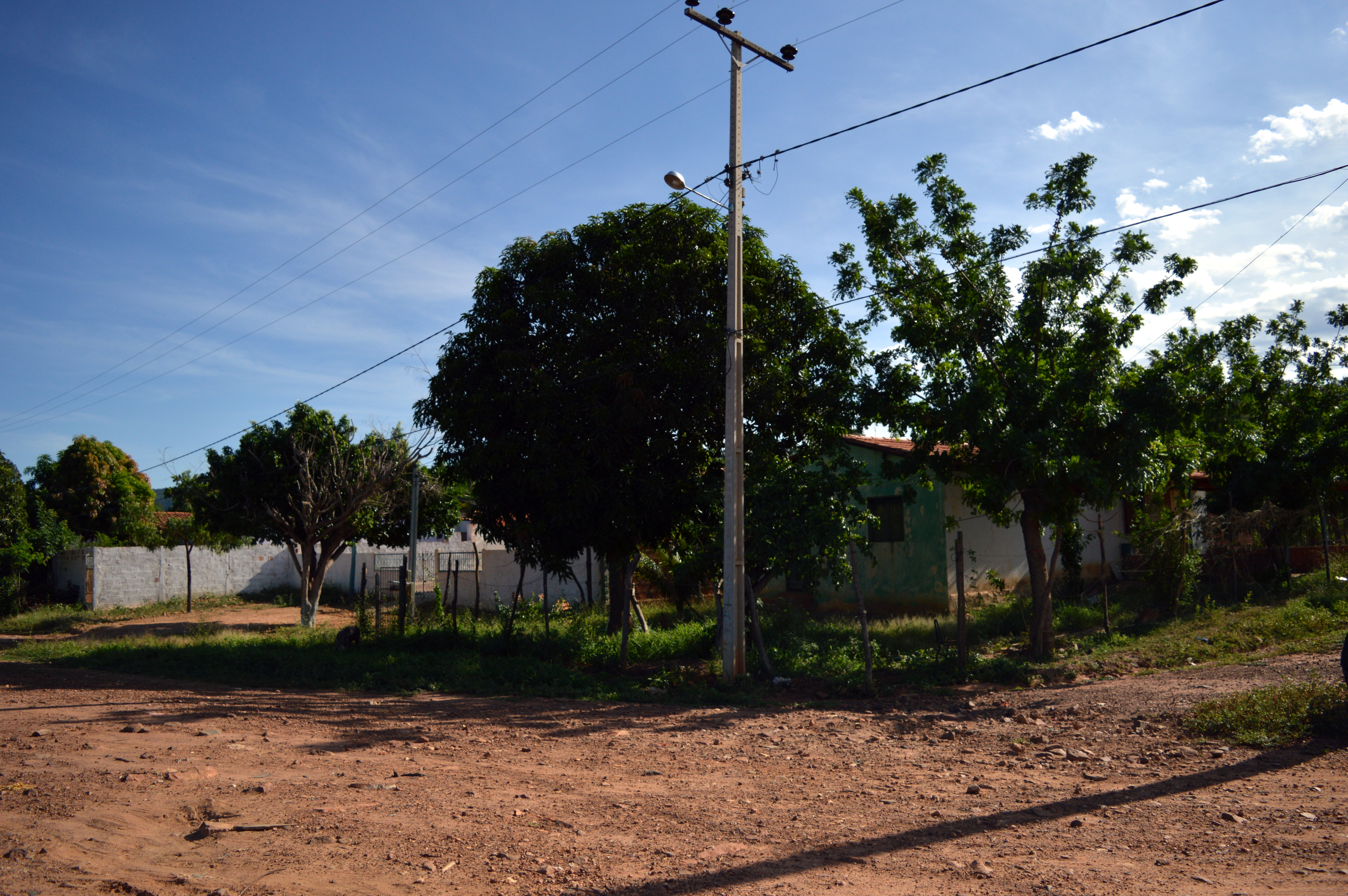 Vista do povoado Vale da Serra a partir da BA-160